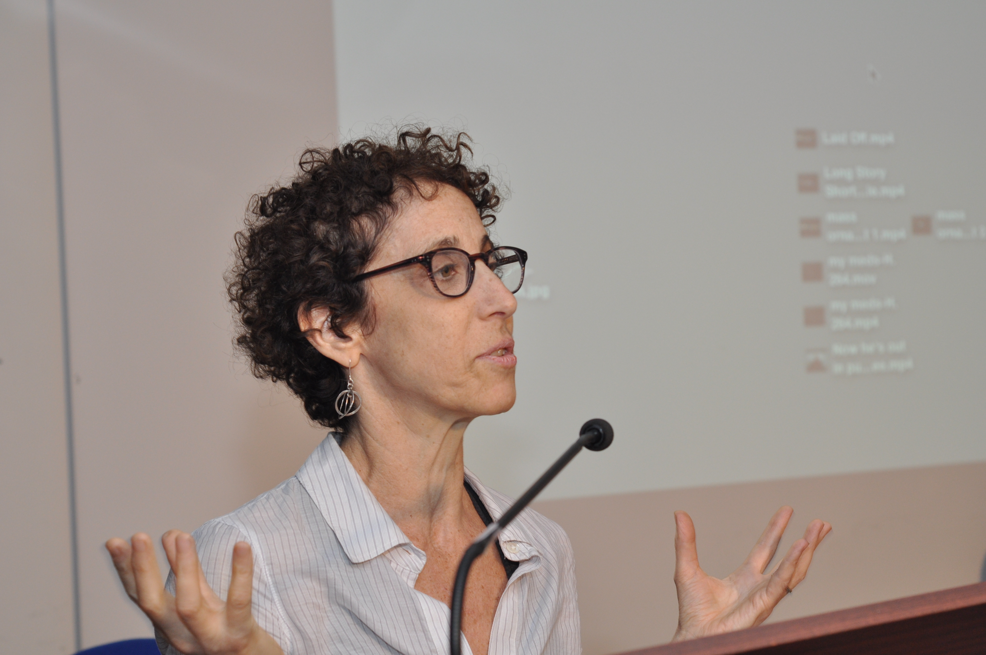 Day 2